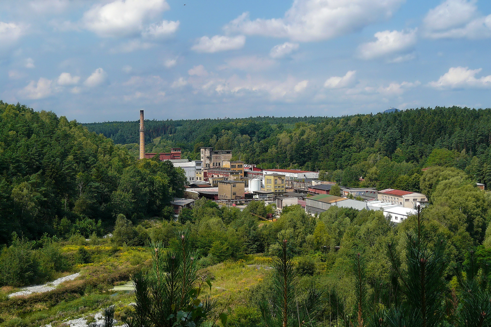 Bělské papírny v údolí Bělé, vzadu hrad Bezděz